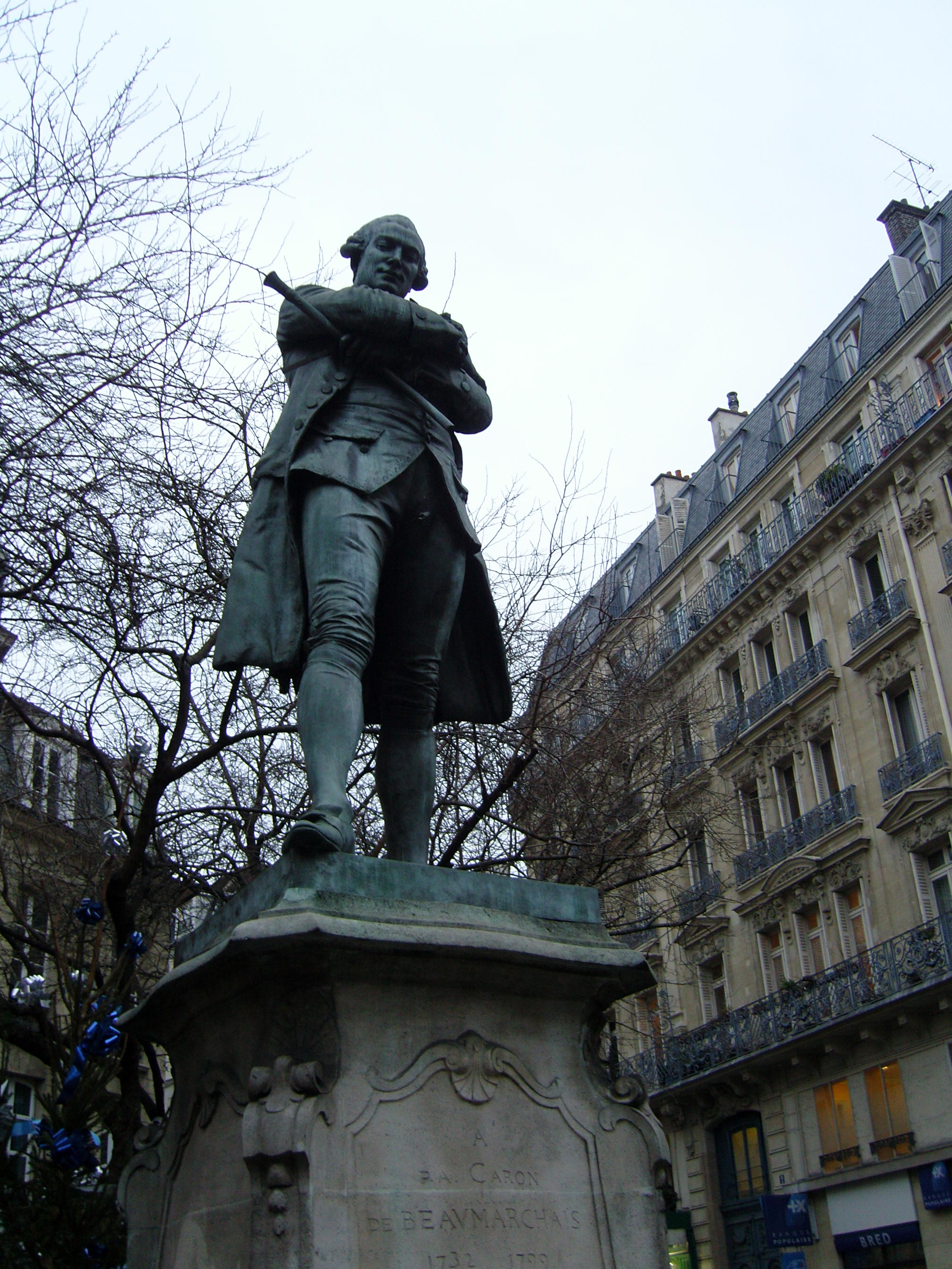 Louis Clausade (1862-1899), Monument à Beaumarchais, situé au croisement de la rue des Tournelles et de la rue Saint-Antoine à Paris.